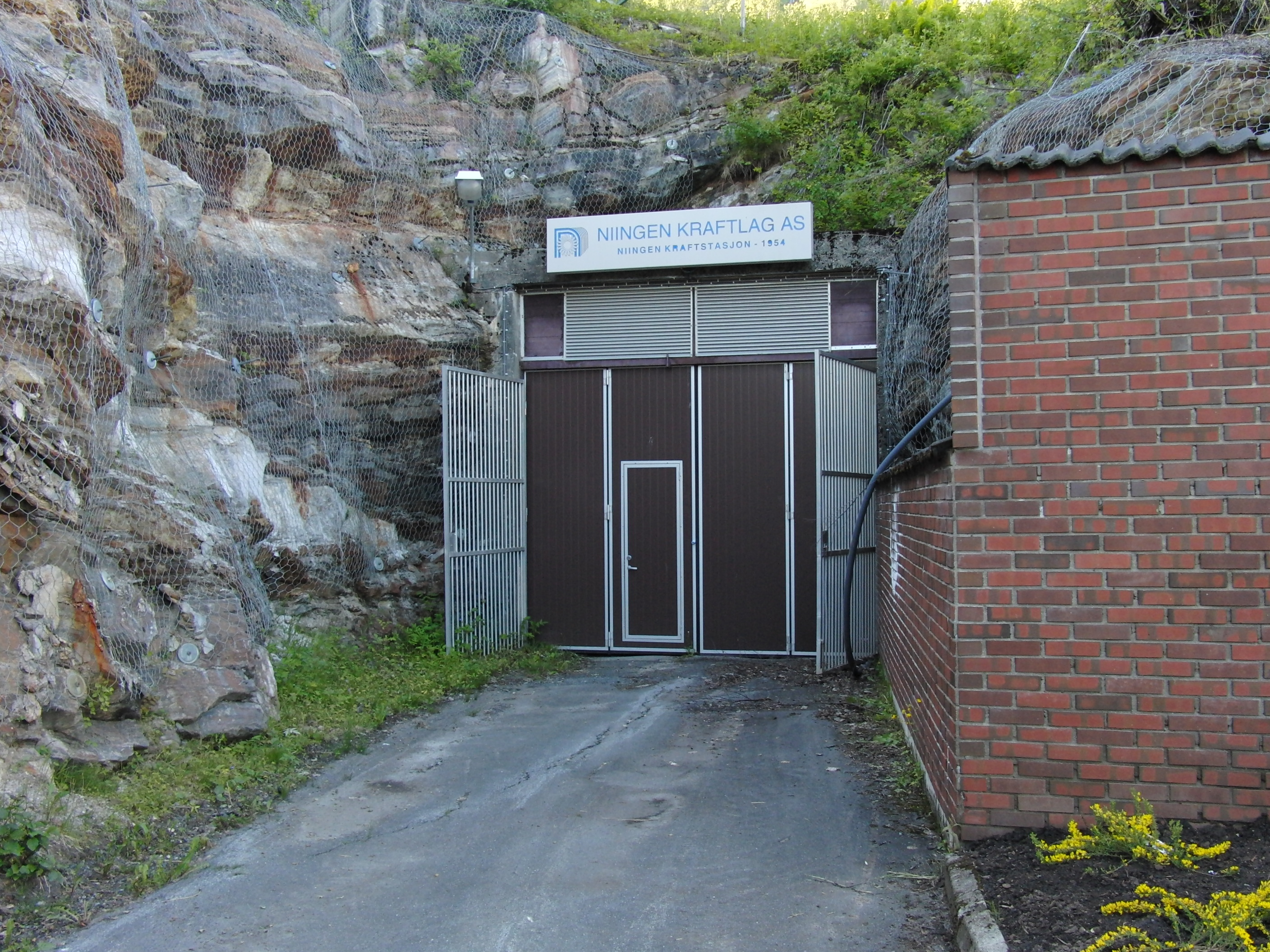 Niingen gamle kraftverk